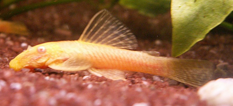 Albino Antennenwels (Ancistrus spec.)